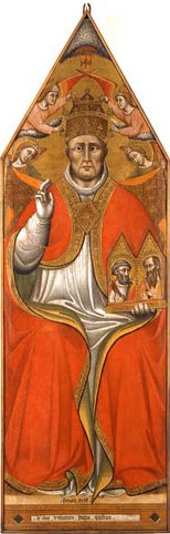 Urbanus V, Popelabel QS:Len,"Urbanus V, Pope" label QS:Lfr,"Pape Urbain V" label QS:Lde,"Papst Urban V."